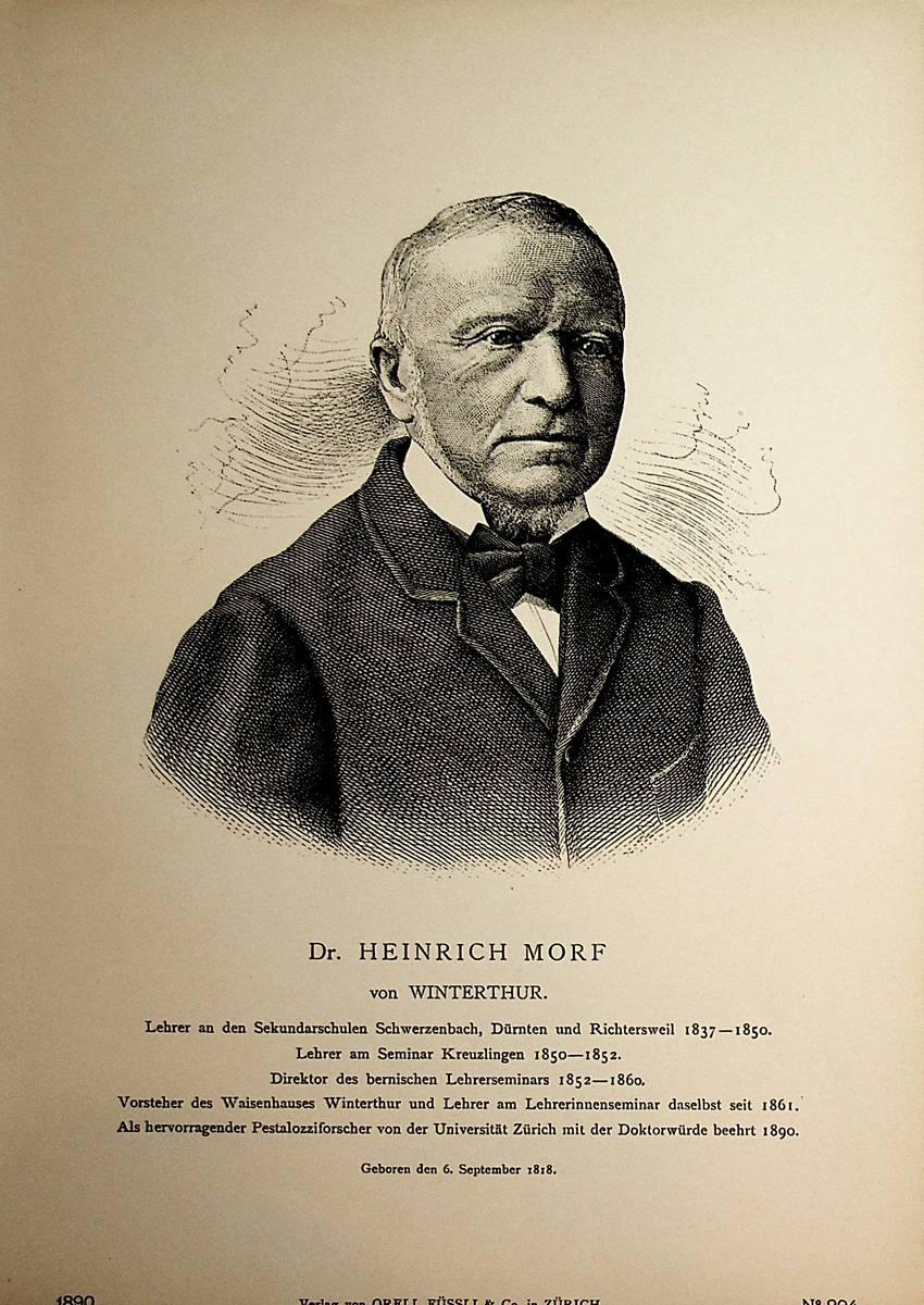 Heinrich Morf, Winterthur ZH, Schweiz 1818-1899